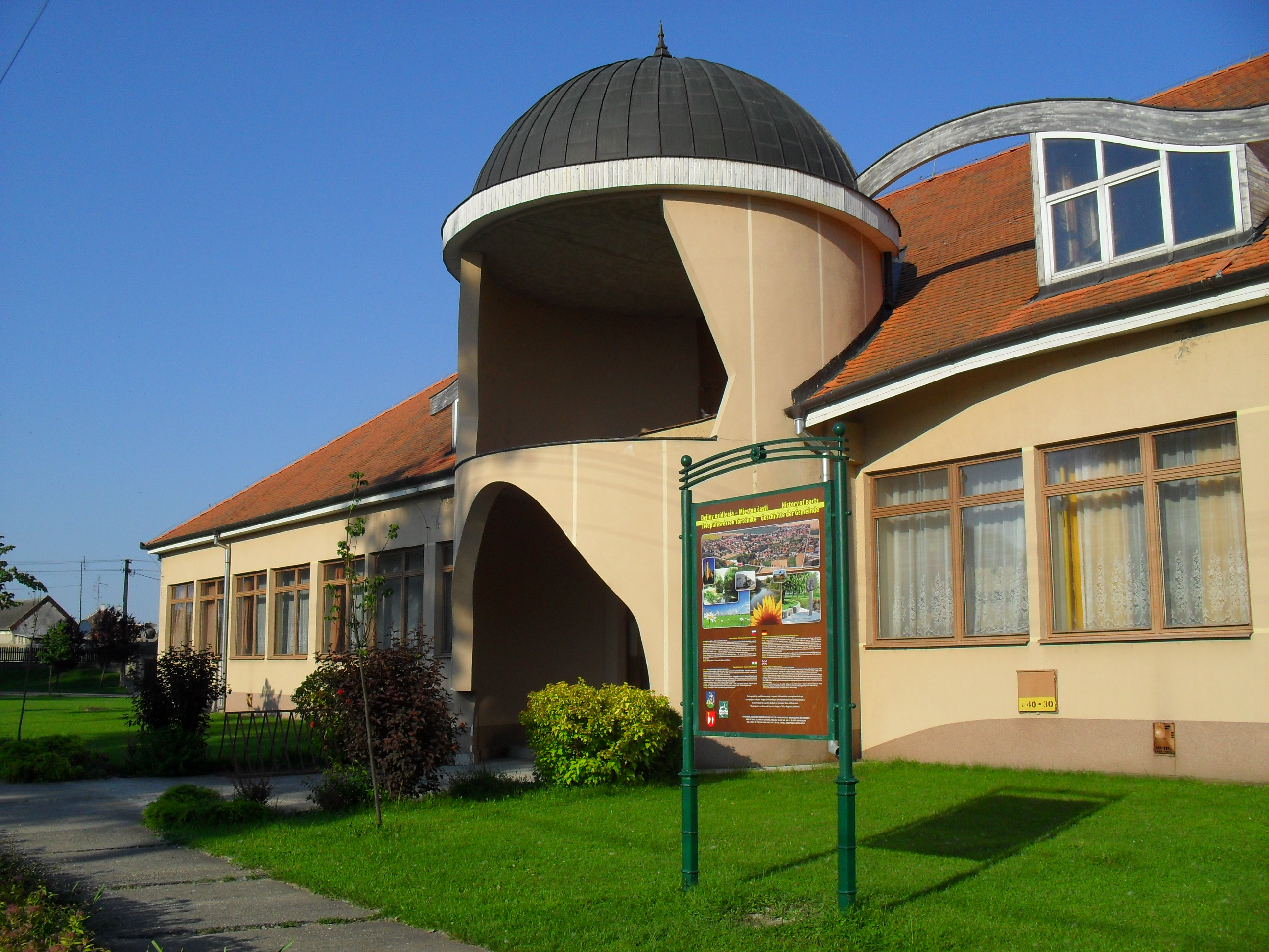 Csallóközaranyos - kultúrház